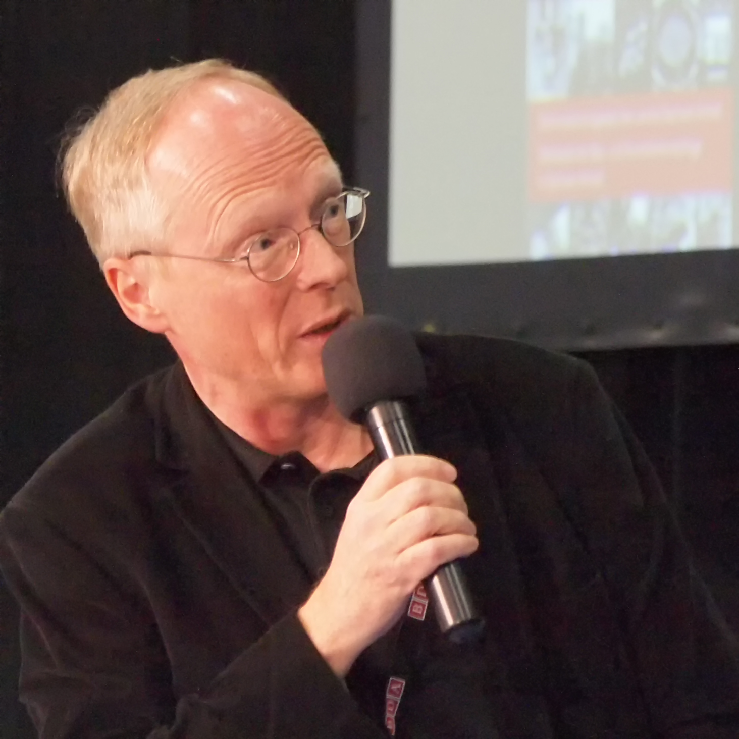 Dr. Bernd Euler-Rolle vom Bundesdenkmalamt Österreich auf der Monumento 2014 in Salzburg Personality rights warningAlthough this work is freely licensed or in the public domain, the person(s) shown may have rights that legally restrict certain re-uses unless those depicted consent to such uses. In these cases, a model release or other evidence of consent could protect you from infringement claims.